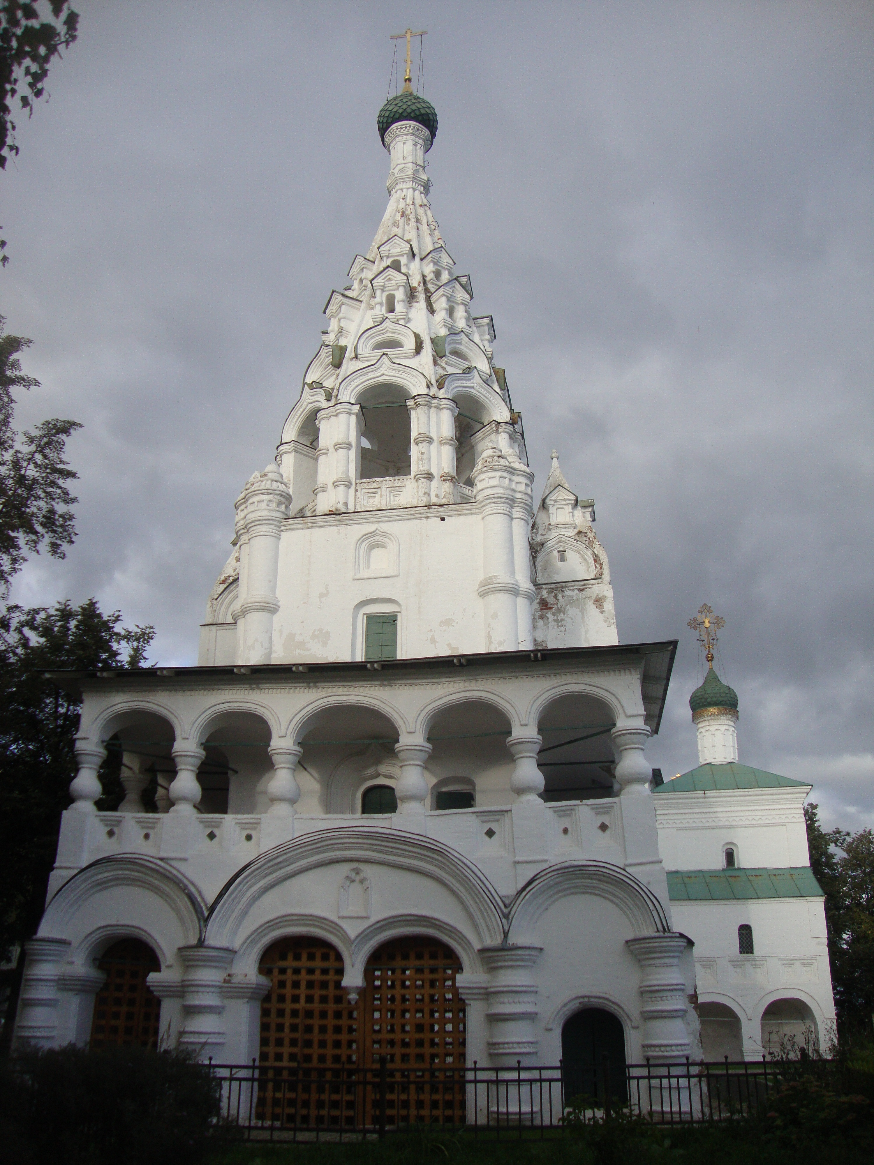 Колокольня церкви Рождества Христова, ул. Кедрова, 1/35, Ярославль